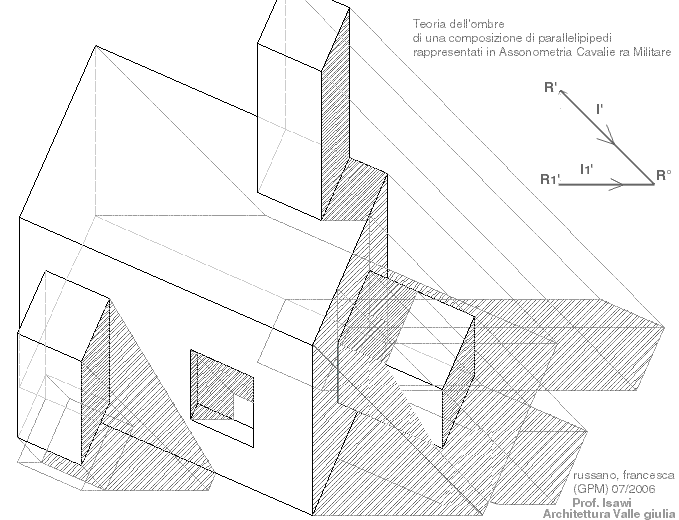 Teoria delle ombre in assonometria militare ed in proiezioni ortogonali.